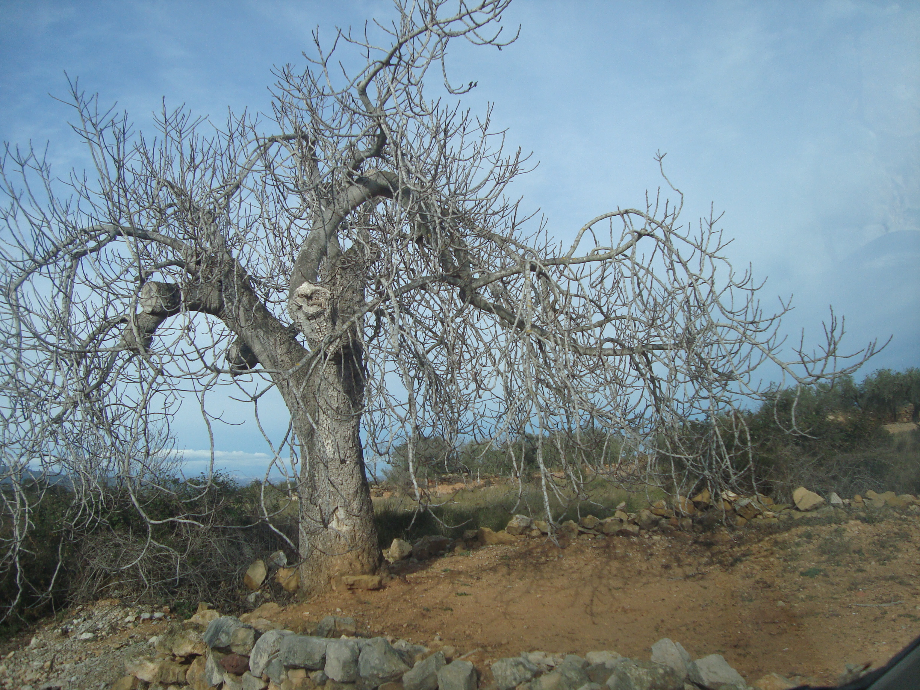 Figuera a l'hivern